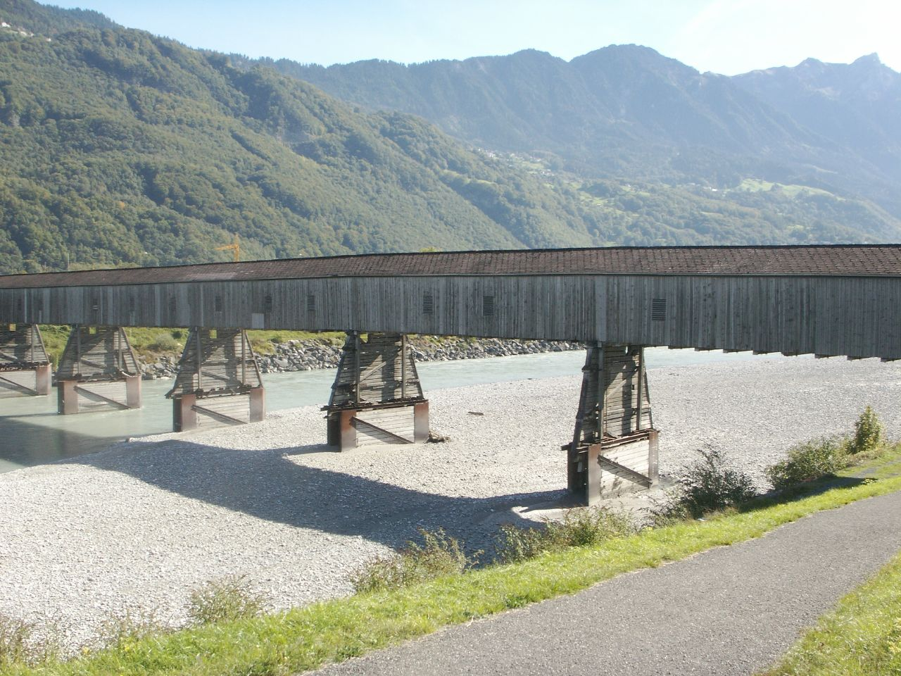 Rhine Bridge, Vaduz